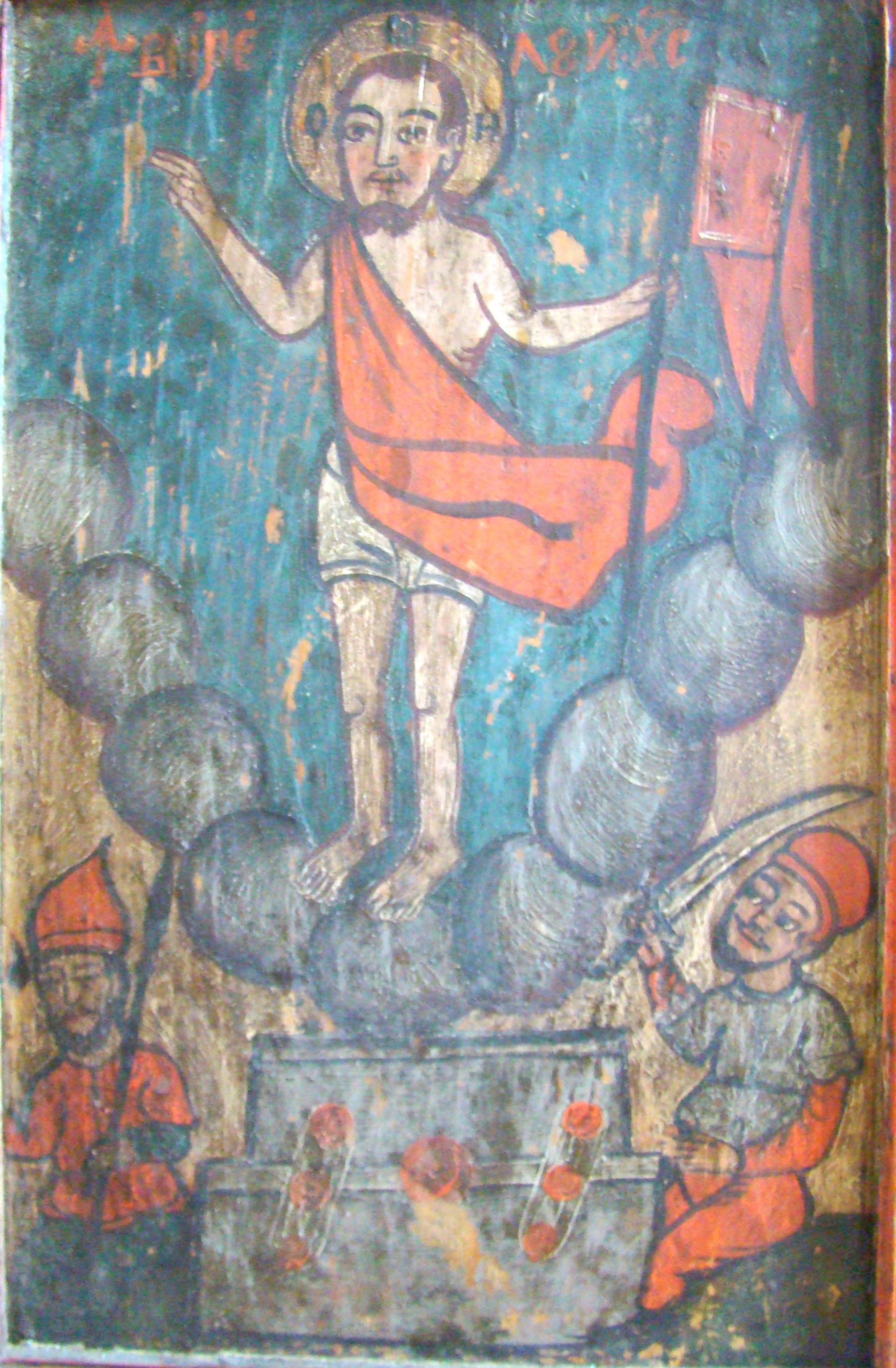 Bunuri de patrimoniu Bihor